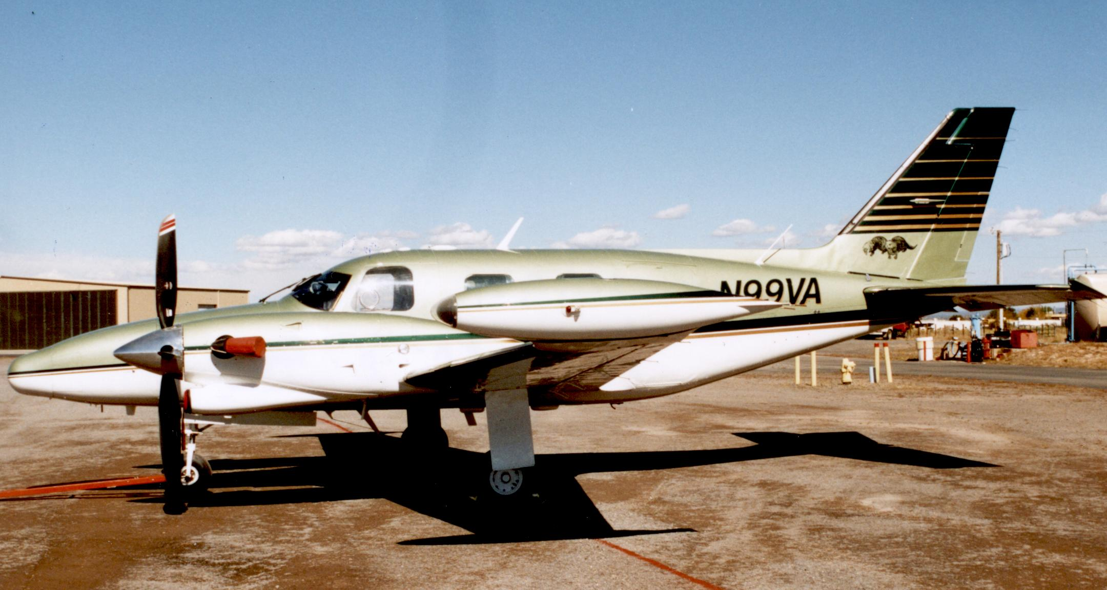 Piper PA-31T Cheyenne at Valle, Arizona